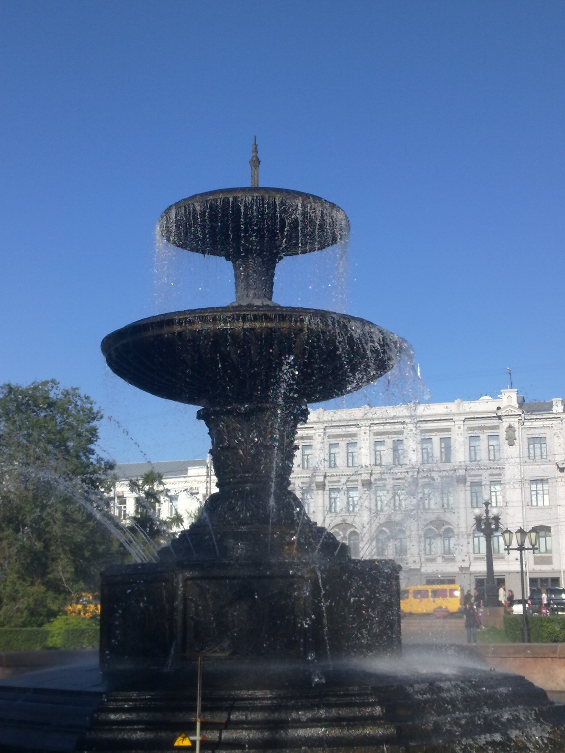 Фонтан около Администрации города Омска